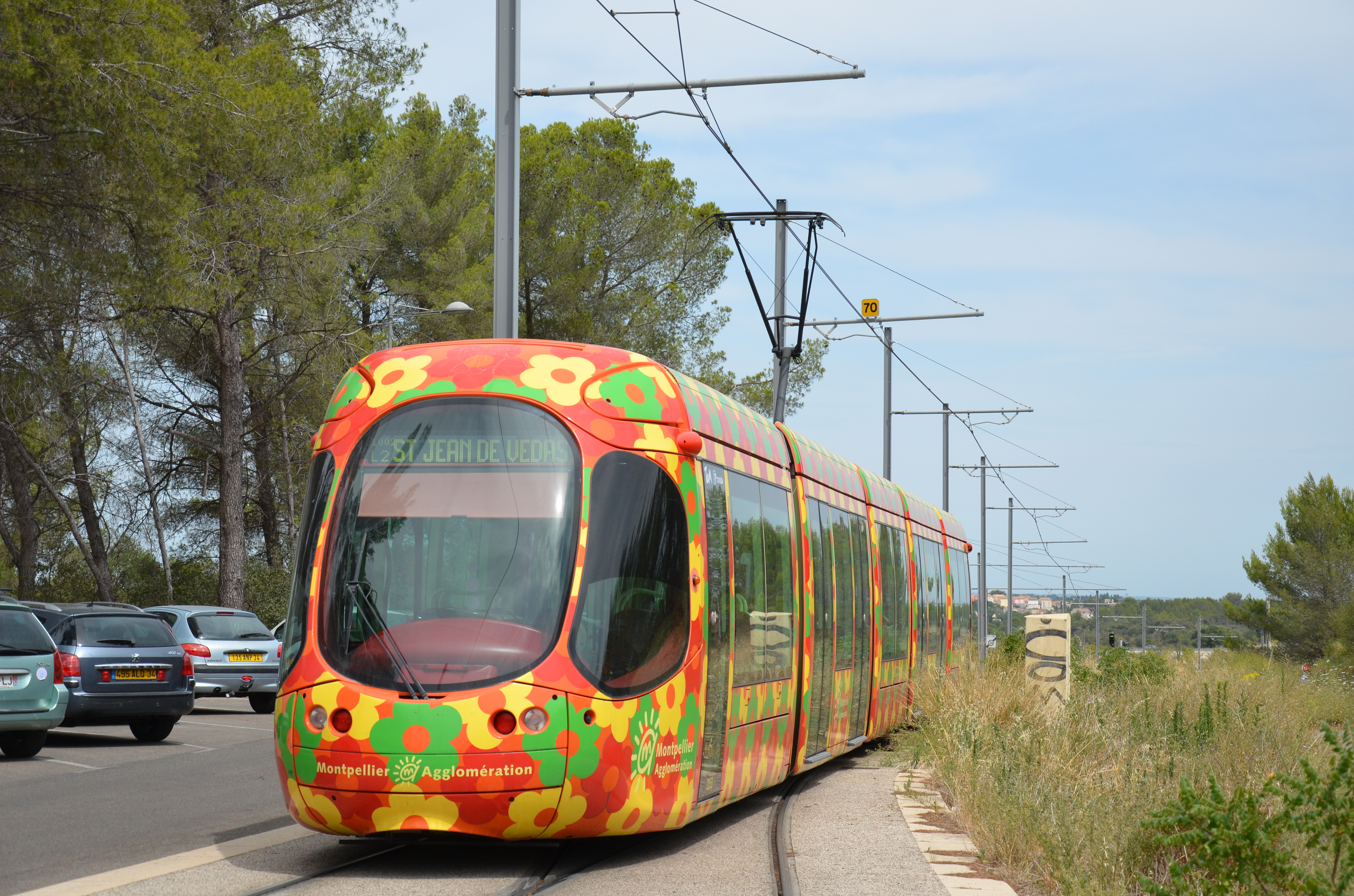 Alstom Citadis 302 n°2050 sur la ligne T2 du réseau TAM de Montpellier, près de son terminus Jacou.